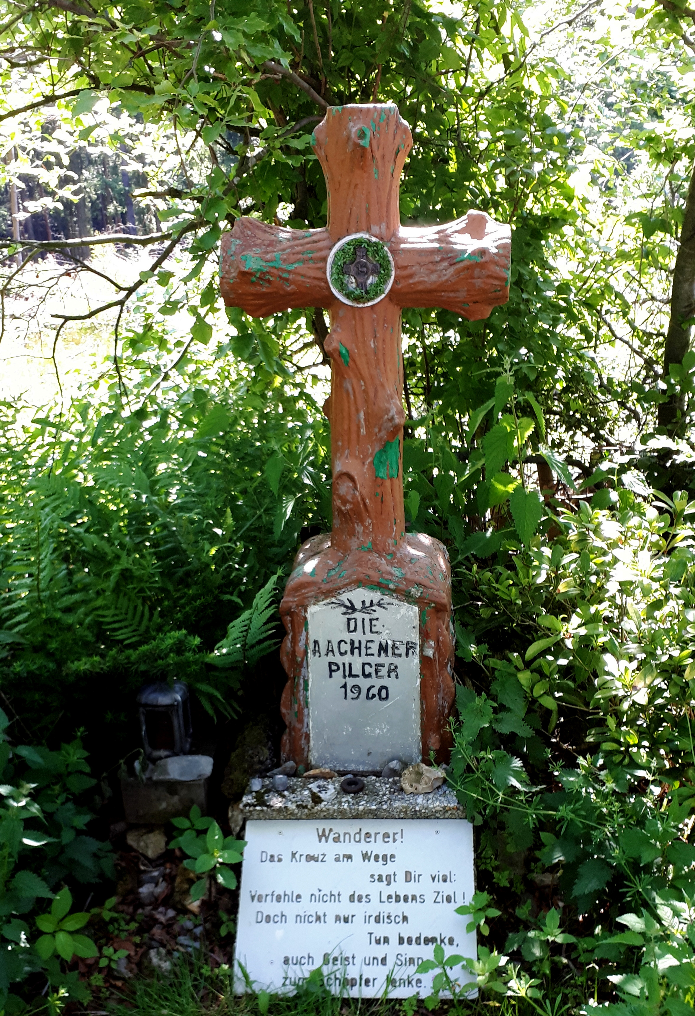 Pilgerkreuz am Moresneter Weg im Preuswald auf belgischer Seite, Jakobs- und Pilgerweg nach Moresnet, gestiftet 1960 von den Aachener Fußpilgern. Tafeltext: "Wanderer! Das Kreuz am Wege sagt dir viel: verfehle nicht des Lebens Zeit! Doch nicht nur irdisch Tun bedenke, auch Geist und Sinn zum Schöpfer lenke"